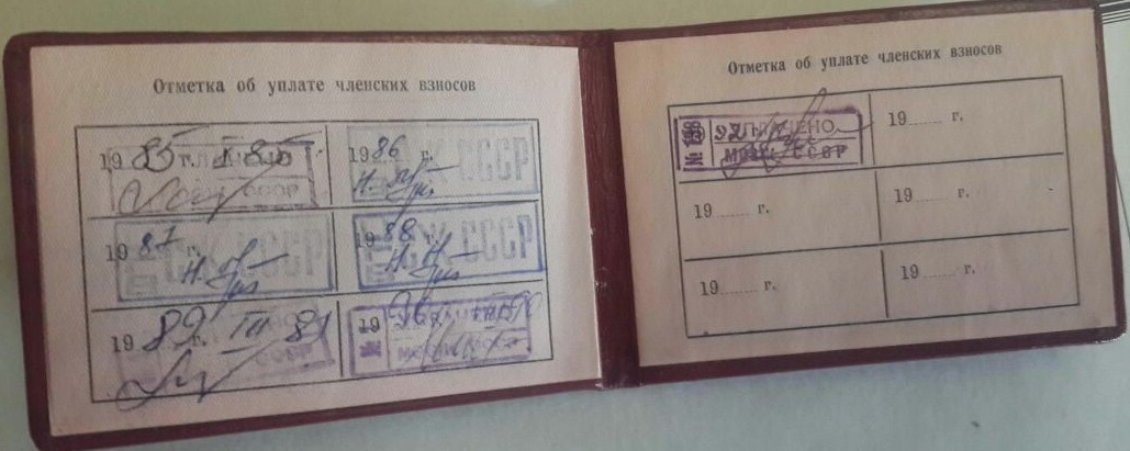 Удостоверение Члена Союза журналистов СССР Кошелева Н.А. разворот